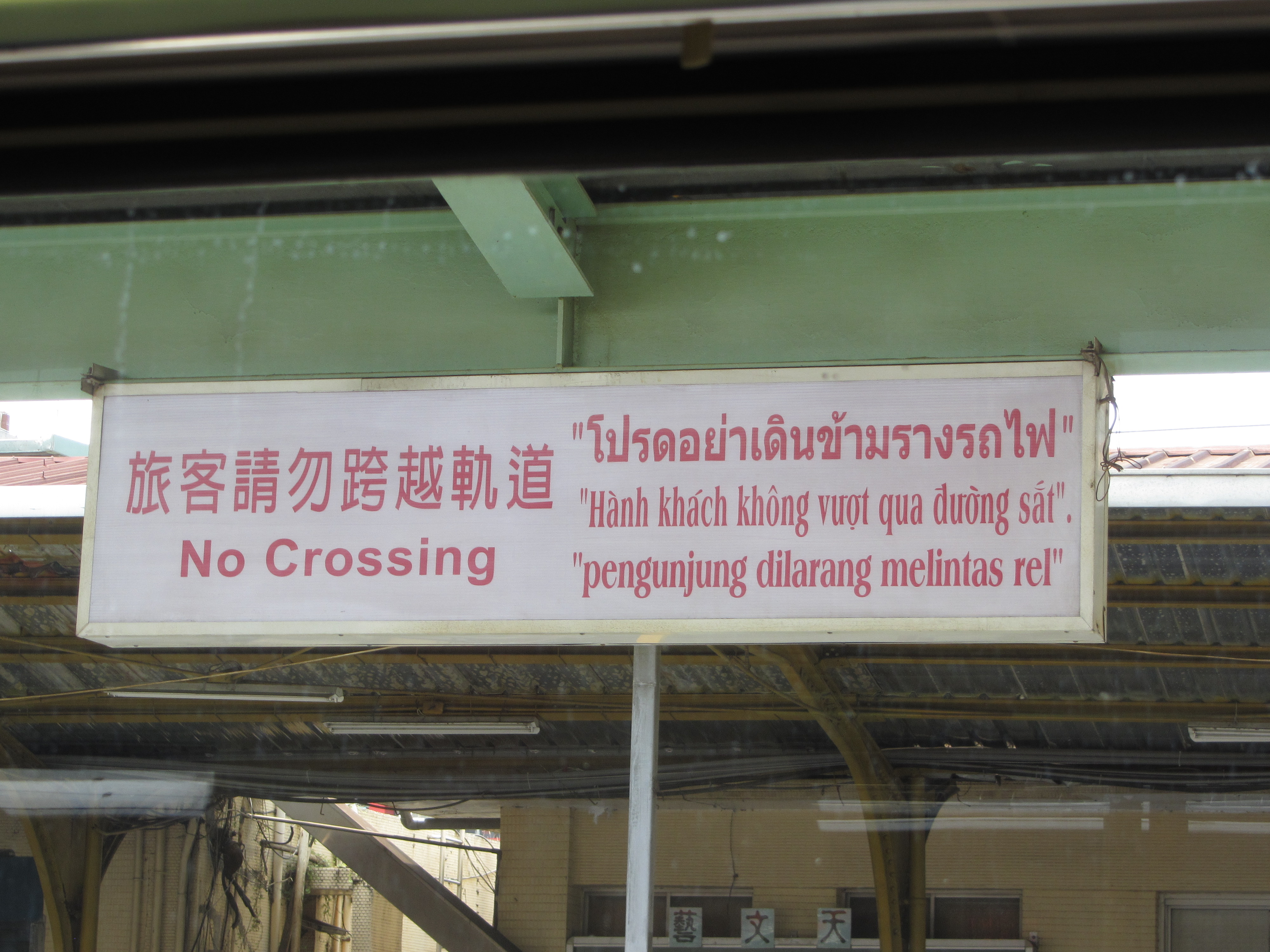 中文（台灣）: 臺灣鐵路管理局中壢車站「旅客請勿跨越軌道」燈箱，以繁體中文、英文、泰文、越南文與印尼文標示。拍攝於靠站列車內。